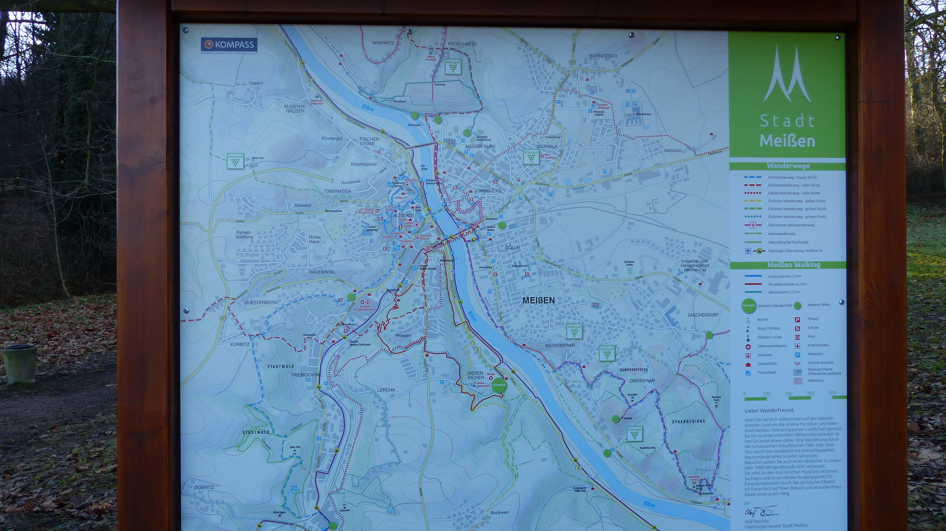 Infotafel mit Stadtplan Meißen, vor dem Tierpark Meißen